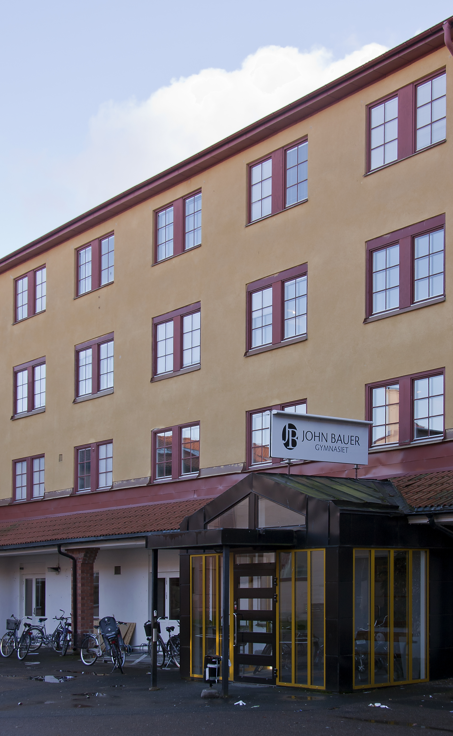 John Bauergymnasiet i Ekeby i Uppsala.